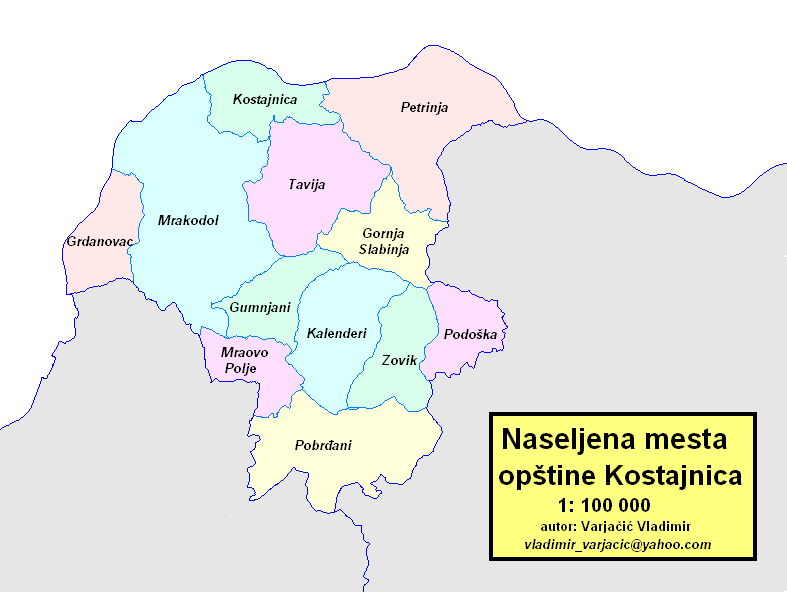 Opština Kostajnica